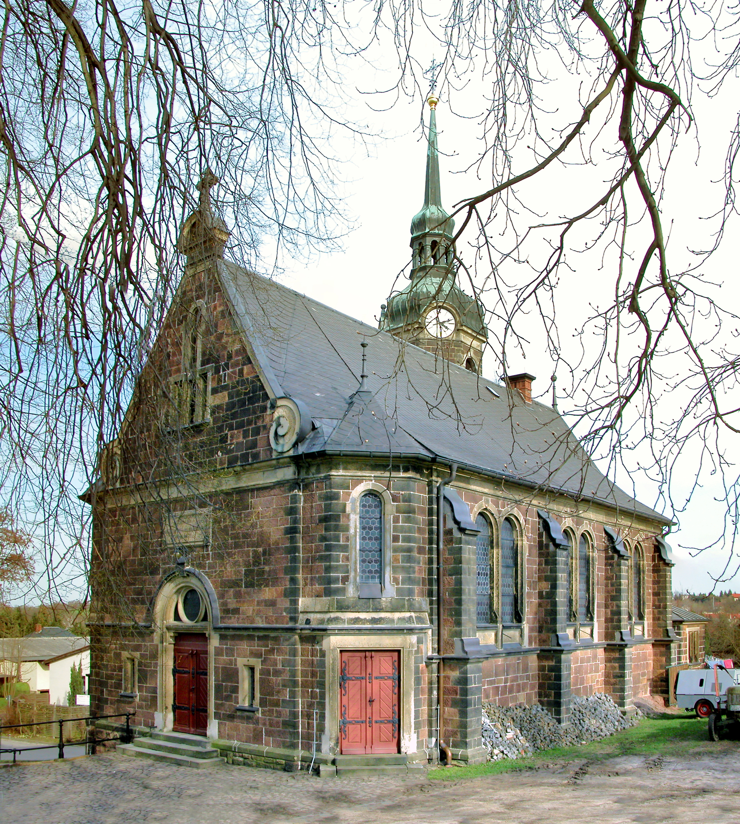 30.03.2010 04749 Ostrau (Sachs.): Trinitatiskirche, Kirchstraße 9 (GMP: 51.20270,13.156905). Erbaut wurde sie 1903 nach Plänen des Architekten Theoder Quentin. Sicht von Südwesten. [DSCN40684-40685.TIF]20100330405MDR.JPG(c)Blobelt